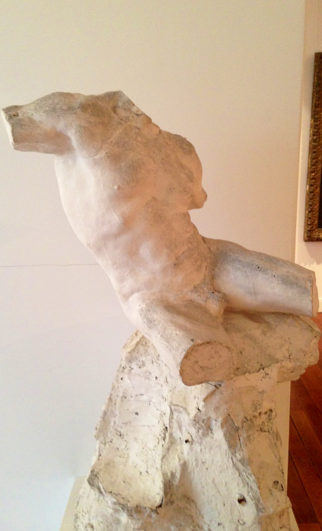 Torse de Sisyphe, réalisé par Jules Desbois en 1908, musée des Beaux-Arts de Tours.